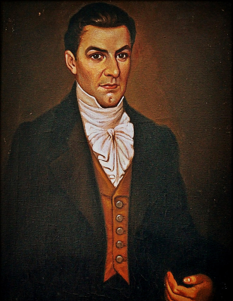 Retrato del general salvadoreño Manuel José Arce y Fagoaga en el Museo de Historia Militar de El Salvador.